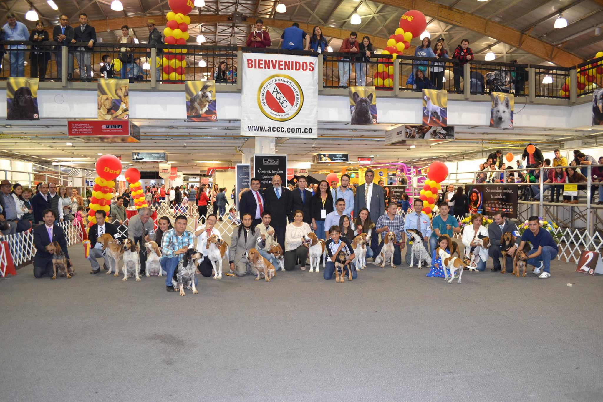 presentacion de la raza en feria expopet -Bogotá